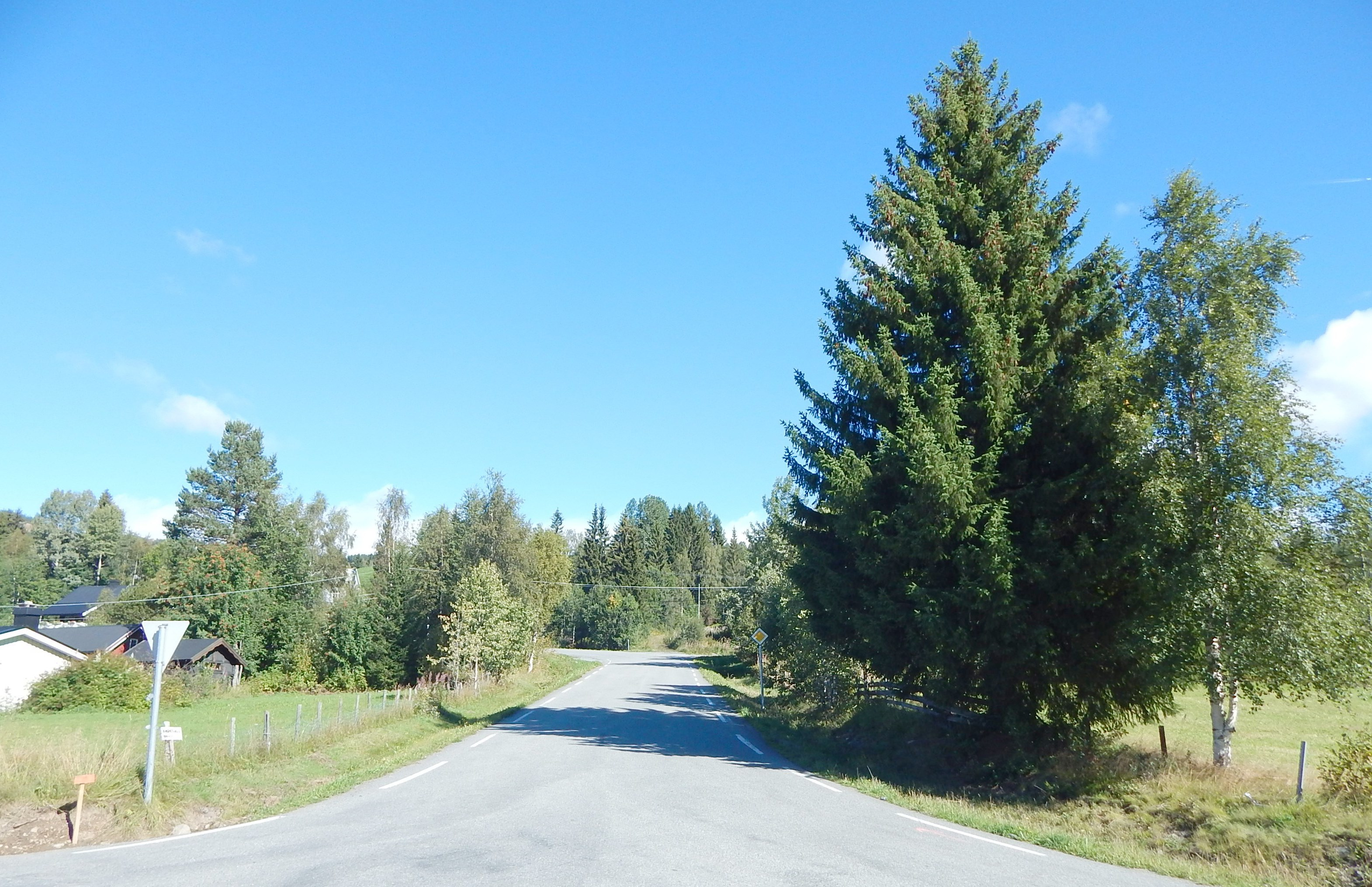 Synnfjellvegen (FV2436, tidl. 196) nede ved Nord-Torpvegen